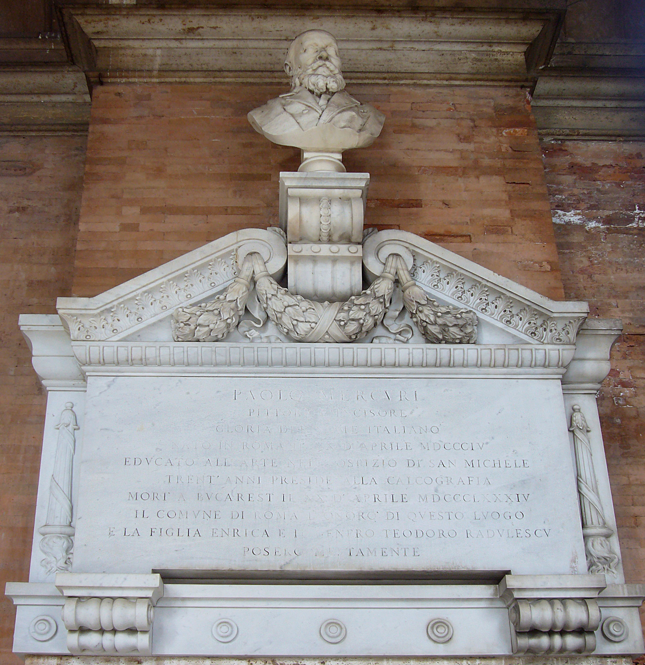 Roma, cimitero del Verano. Tomba di Paolo Mercuri, incisore (1804-1884), nell'ingresso